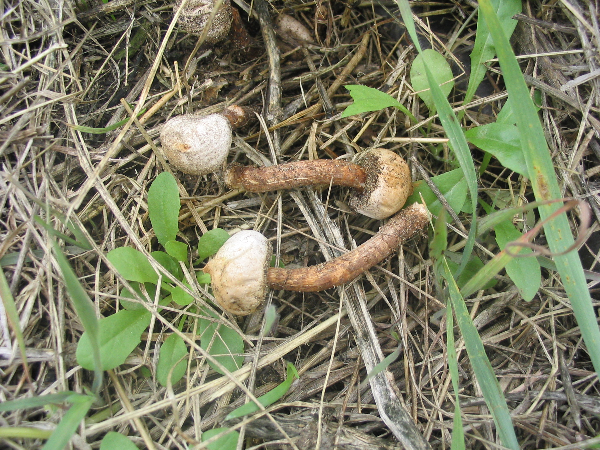 Gewimperter Stielbovist (Tulostoma fimbriatum) aufgenommen am 29.09.2007 von Dr. Hagen Graebner